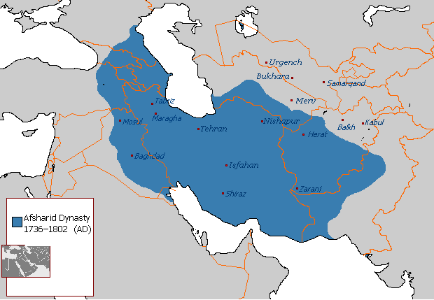 Afsharid Dynasty 1736 - 1802 (AD).